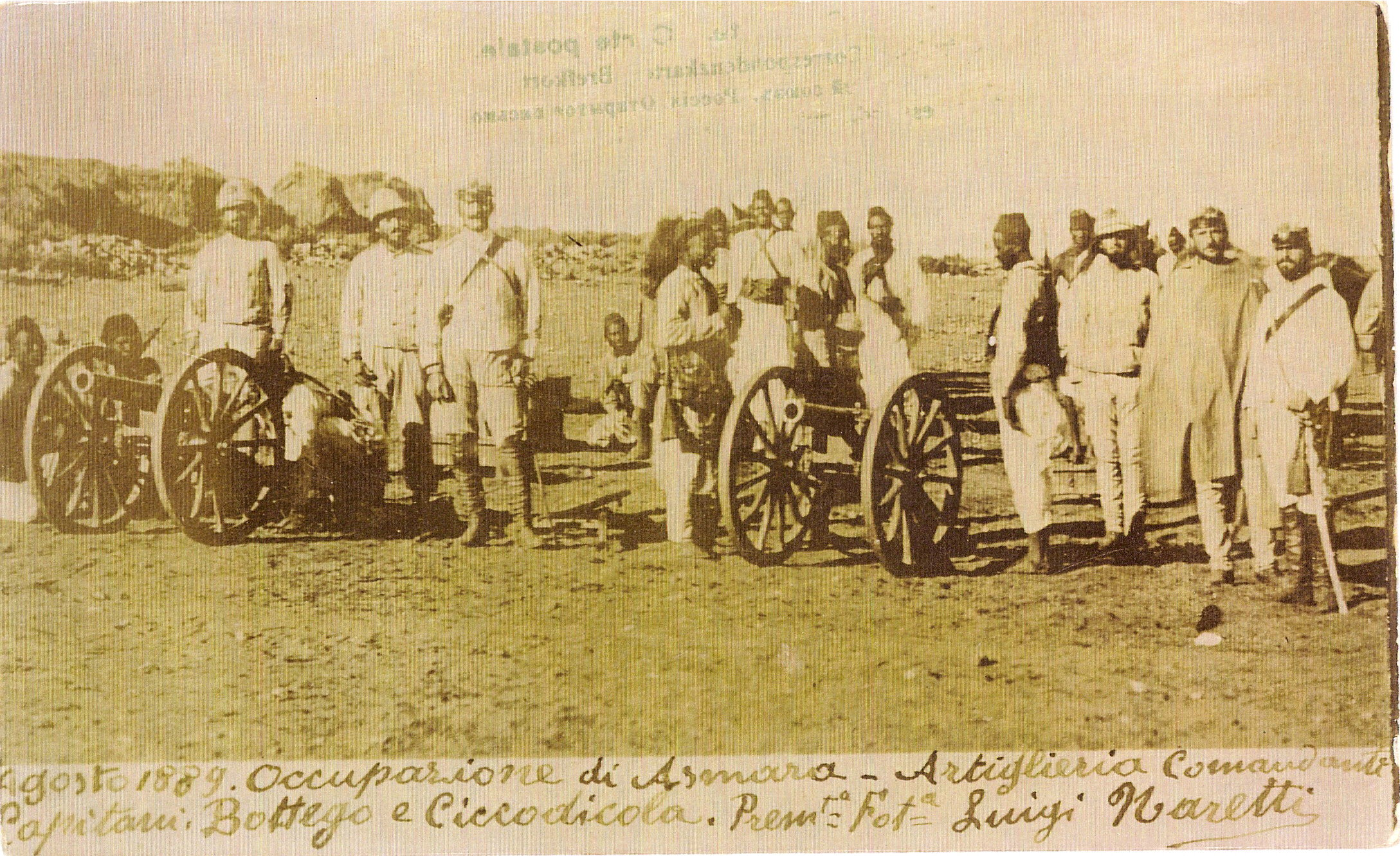 Fotografia di mia proprietà